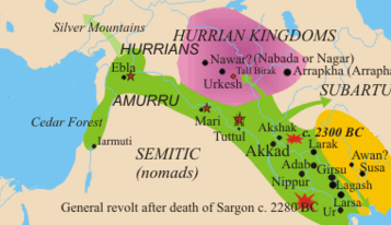 Tuttul